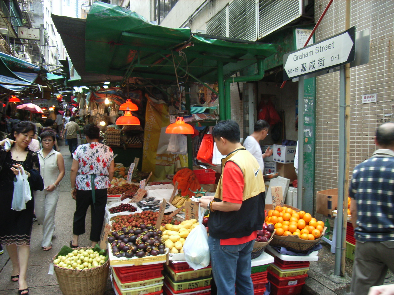 嘉咸街是中環的街市區內的另一條街道，街上沿途有不少街邊賣濕貸的小商販 by TangHon